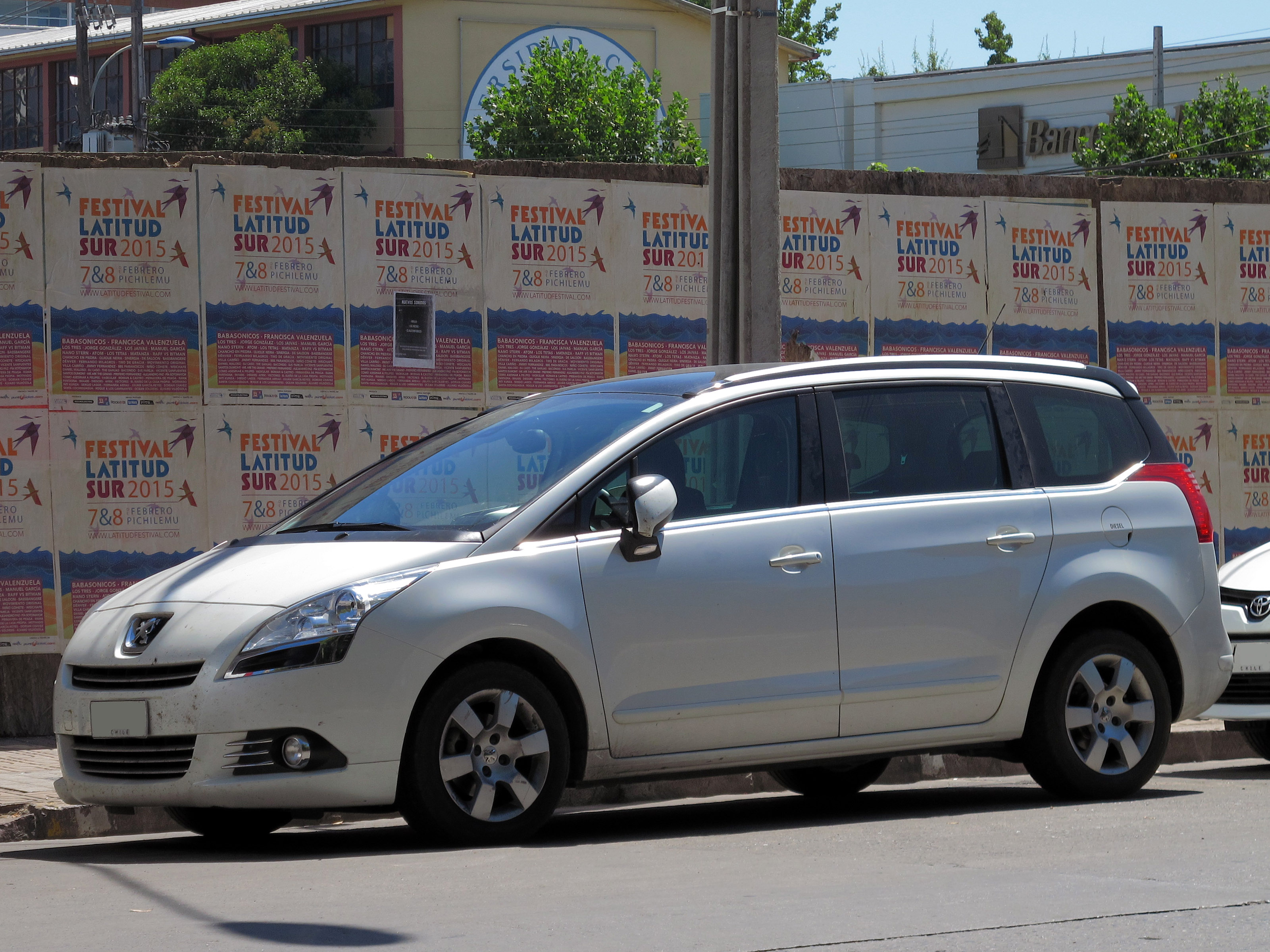 Peugeot 5008 1.6 e-HDi Active 2013